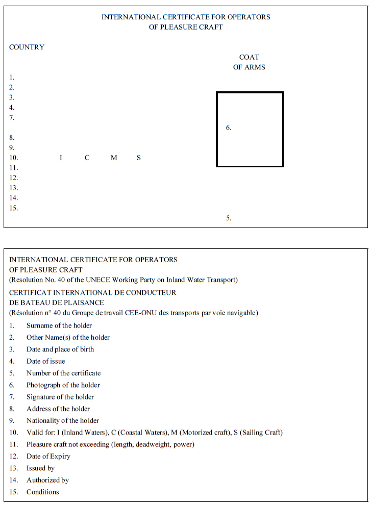 Modèle de certificat international de conducteur de bateau de plaisance